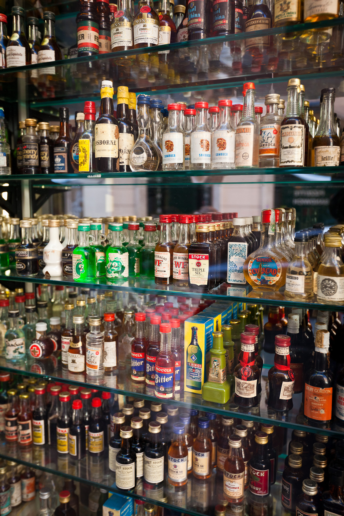 Roma